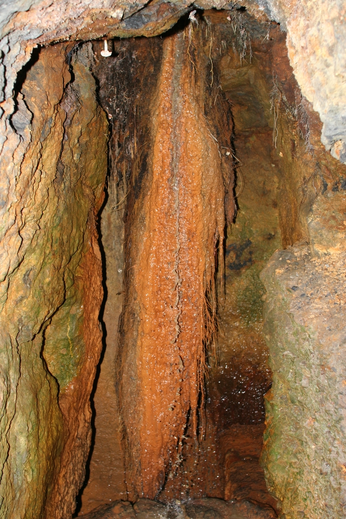 Versinterte Wurzel in den Feengrotten (Saalfeld) Juni 2006